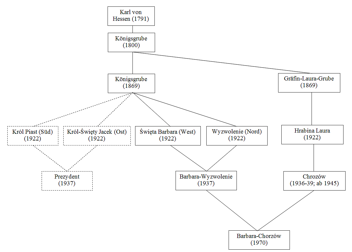 Diagramm zur Abstammung und Bildung des KWK Barbara-Chorzów